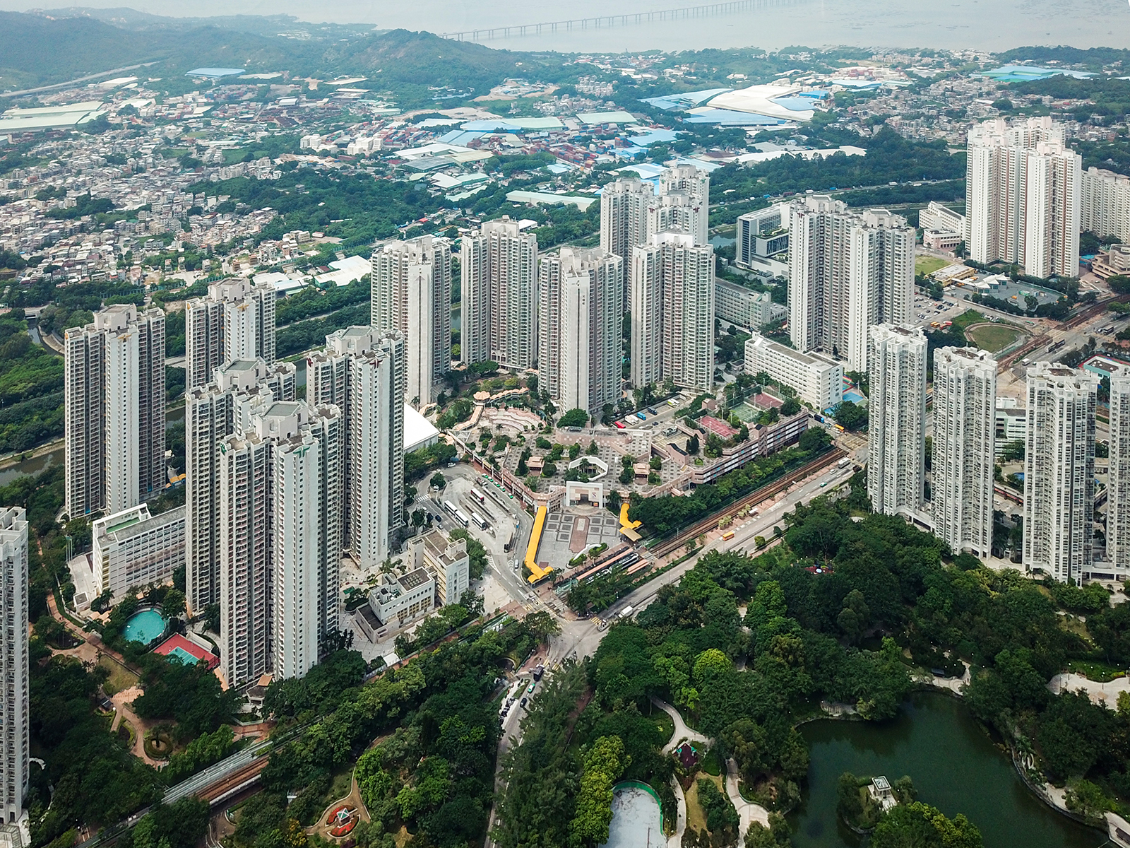 Tin Shui Estate